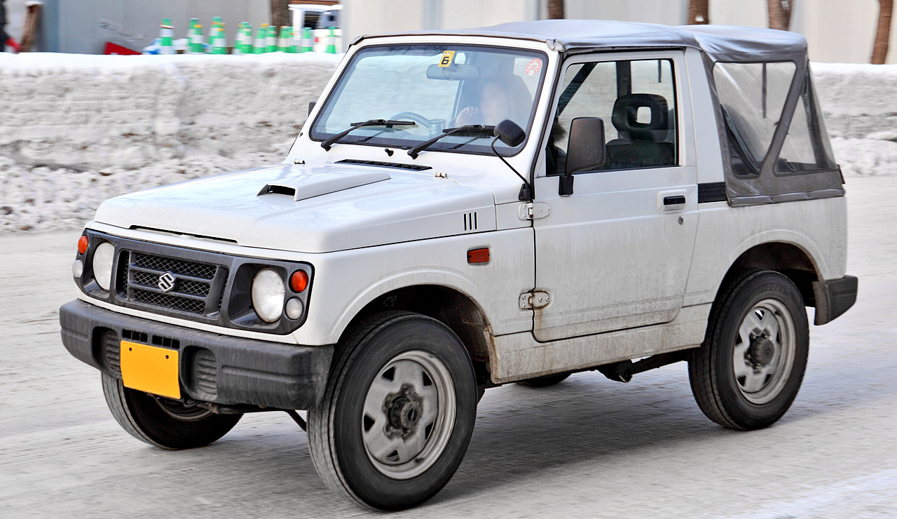 Suzuki Jimny 660 Softtop ( JA12C )